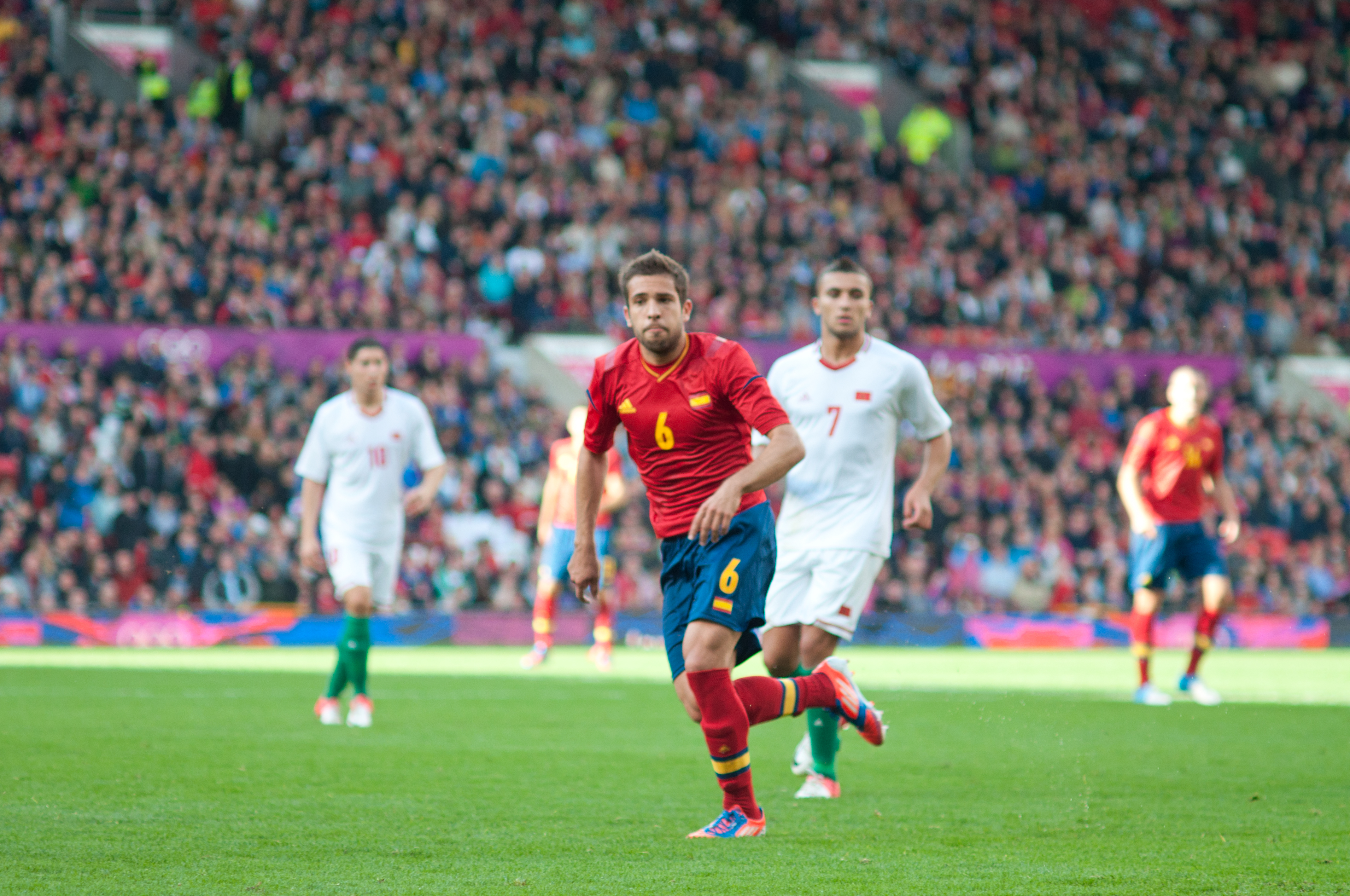 Partido oficial de los Juegos Olímpicos Londres 2012, España vs Marruecos, con resultado de 0 - 0